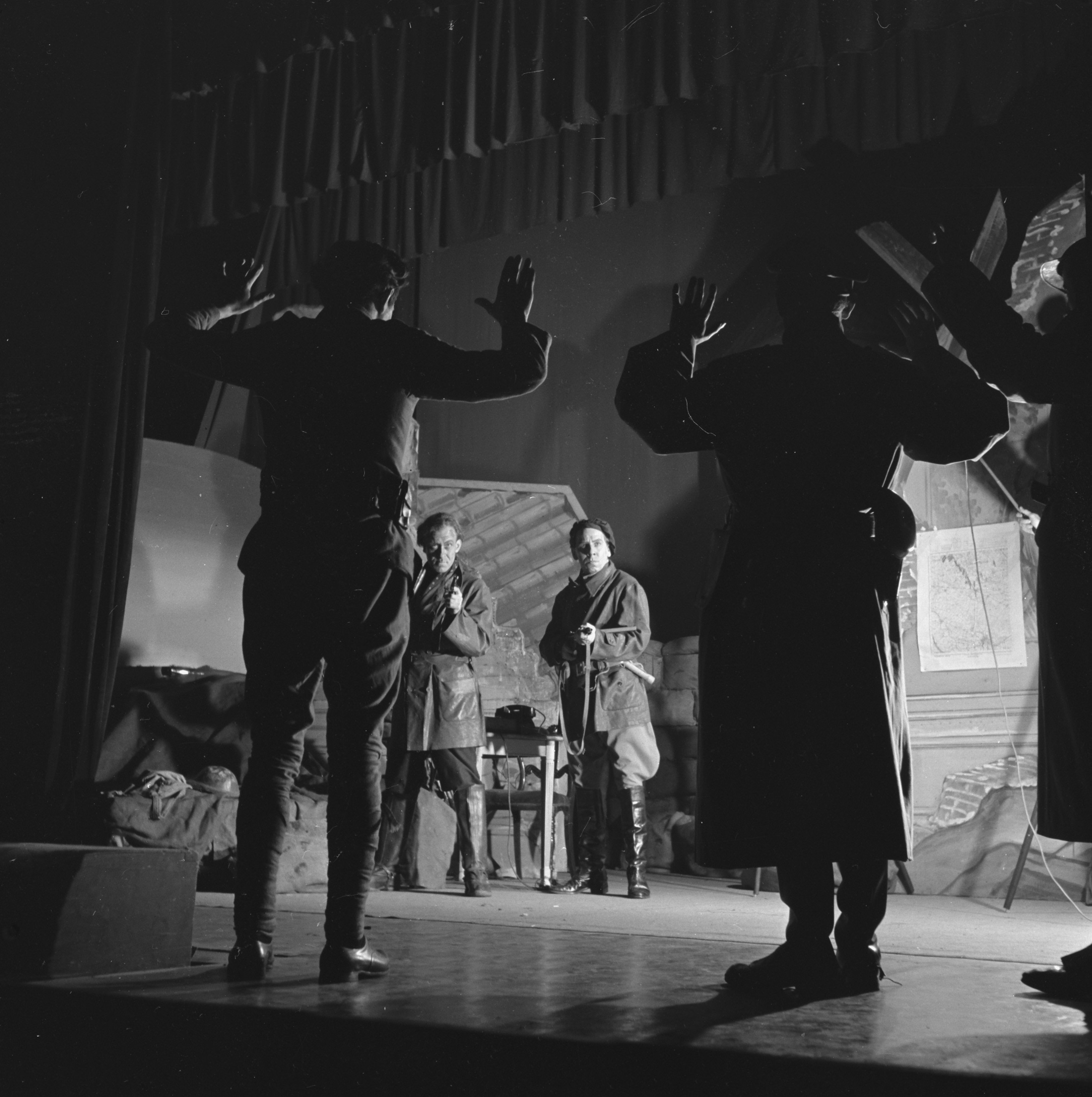 Collectie / Archief : Fotocollectie Anefo Reportage / Serie : [ onbekend ] Beschrijving : Scene uit "De vijfde colonne" (Ernest Hemingway) door Toneelgroep Comedia Datum : 22 november 1945 Locatie : Haarlem Trefwoorden : acteurs, toneel, voorstellingen Instellingsnaam : Toneelgroep Comedia Fotograaf : Taconis, Kryn / Anefo Auteursrechthebbende : Nationaal Archief Materiaalsoort : Negatief (zwart/wit) Nummer archiefinventaris : bekijk toegang 2.24.01.03 Bestanddeelnummer : 901-1239